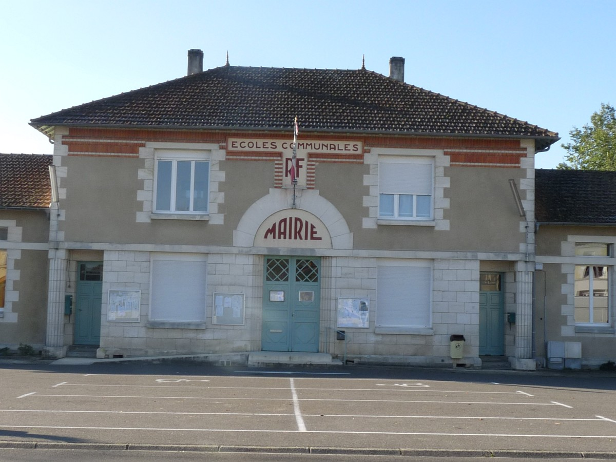 Mairie de Chepniers, Charente-Maritime, France